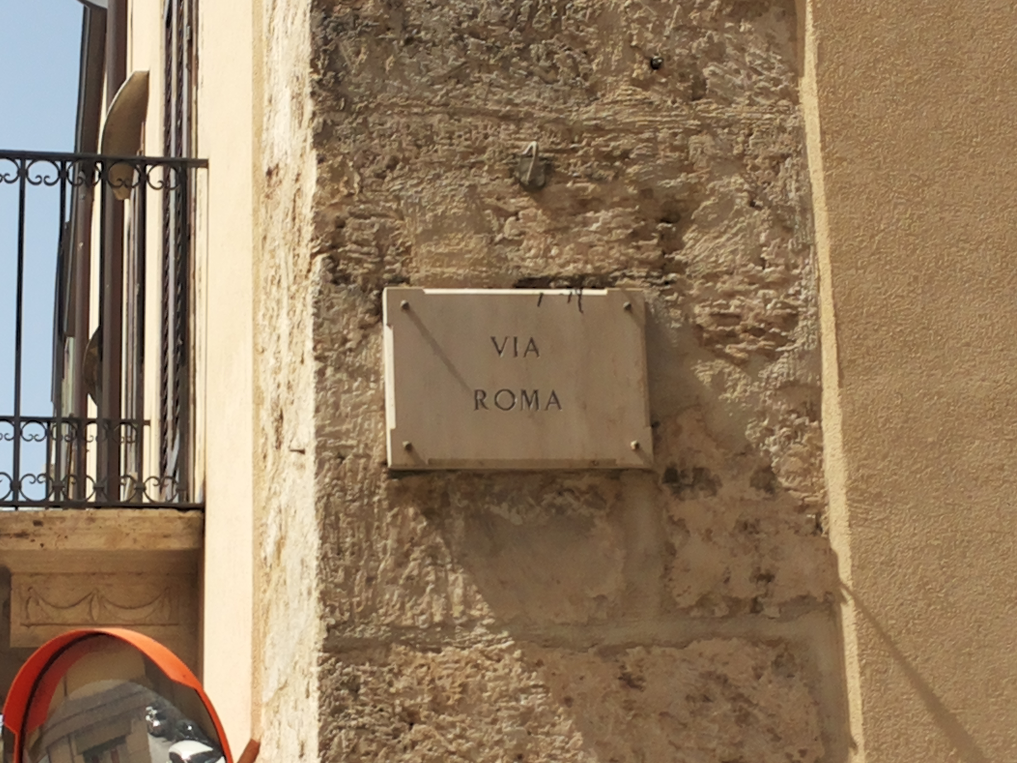 Via Roma, Alcamo